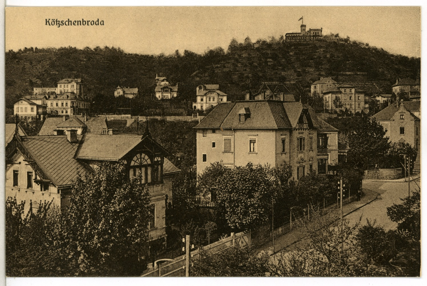 Radebeul; Blick nach der Friedensburg This postcard is from publisher Brück & Sohn in Meißen ( postcard has a unique number 13443 and is available in a higher resolution at the publisher. This images was uploaded in a cooperation project between Wikipedians and the publisher.